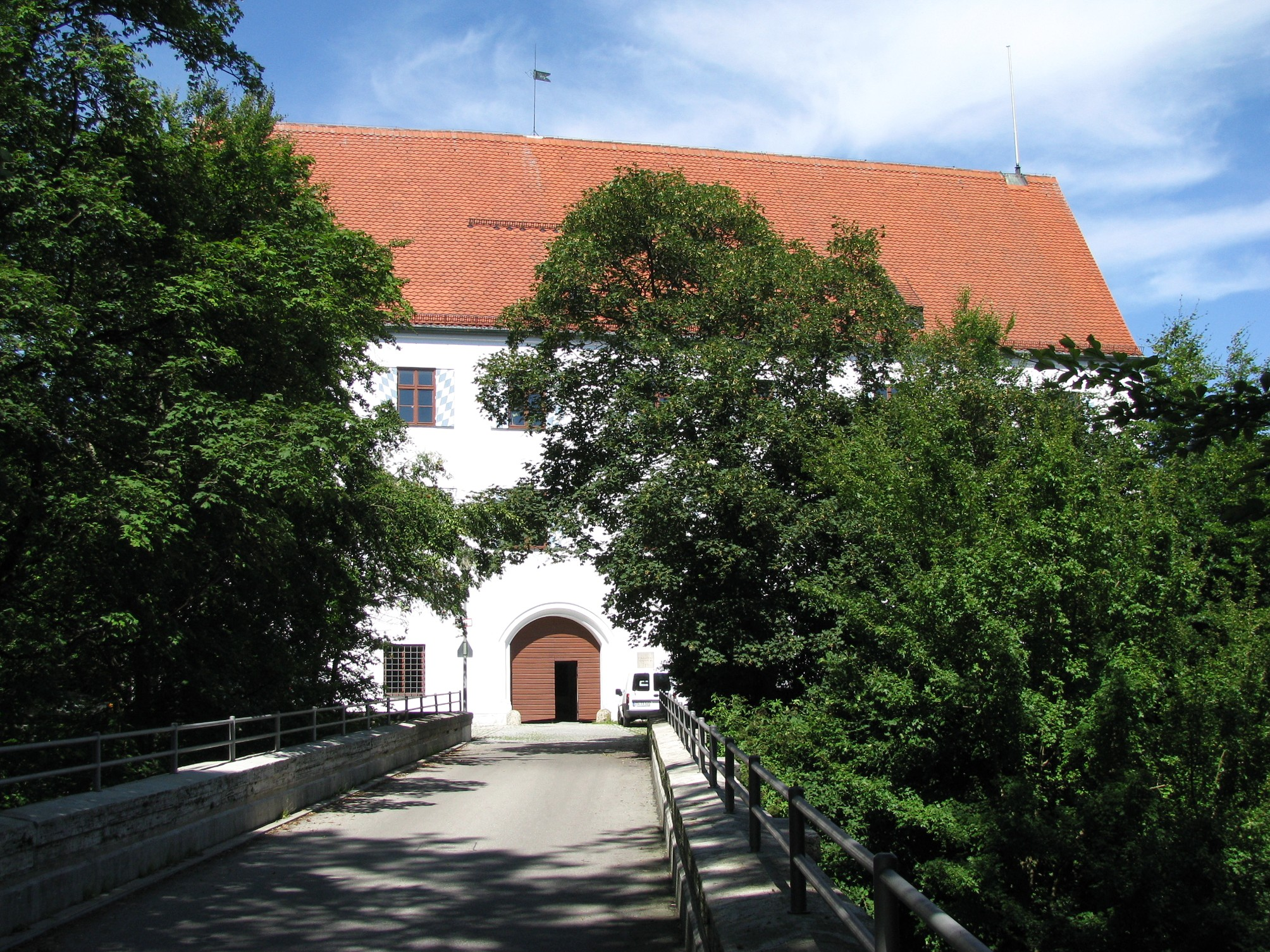 Schloss Starnberg von Südwesten